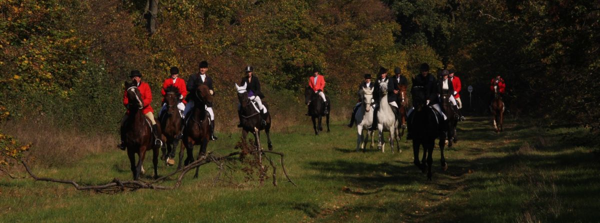 Rókavadászat (lovasverseny) a Hársfasoron, Nagycenk